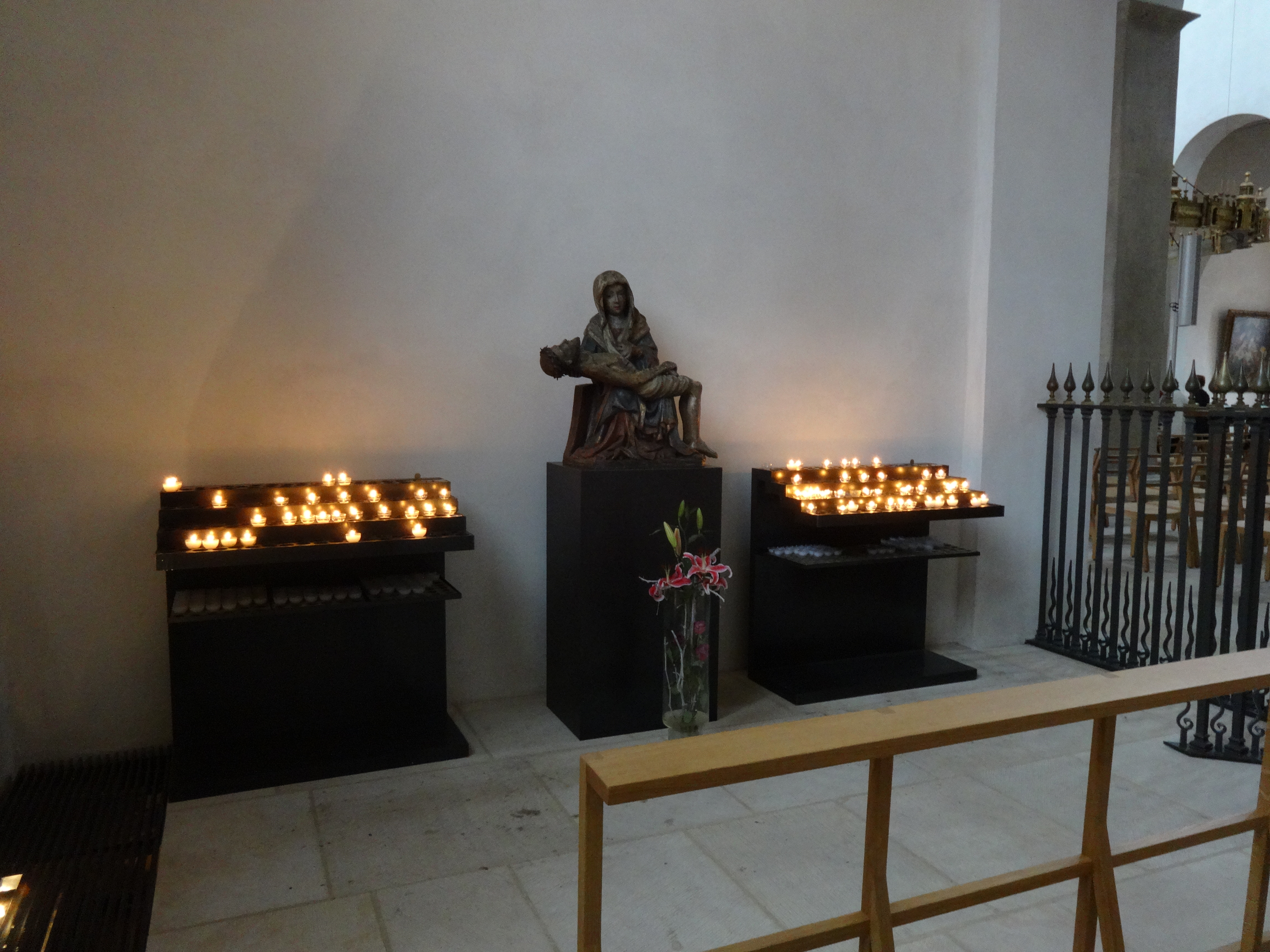 Hildesheimer Dom, Kapelle am nördlichen Seitenschiff, Pietà